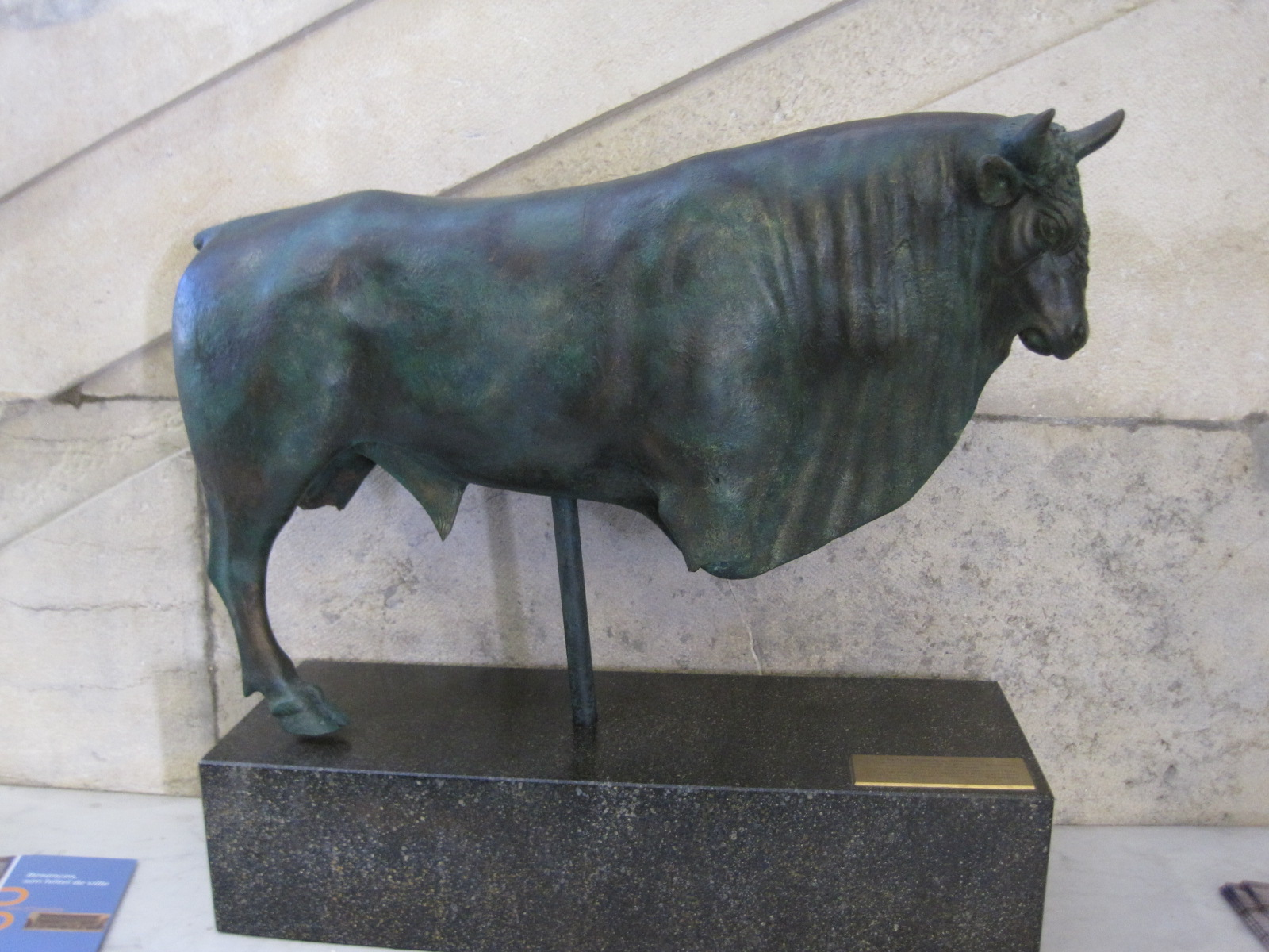 Le taureau d'Avrigney (Haute-Saône). Taureaux à trois cornes dit « Taureau d'Avrigney » Découvert en 1756 - Époque gallo-romaine - Bronze - Musée des Beaux-Arts et d'Archéologie de Besançon